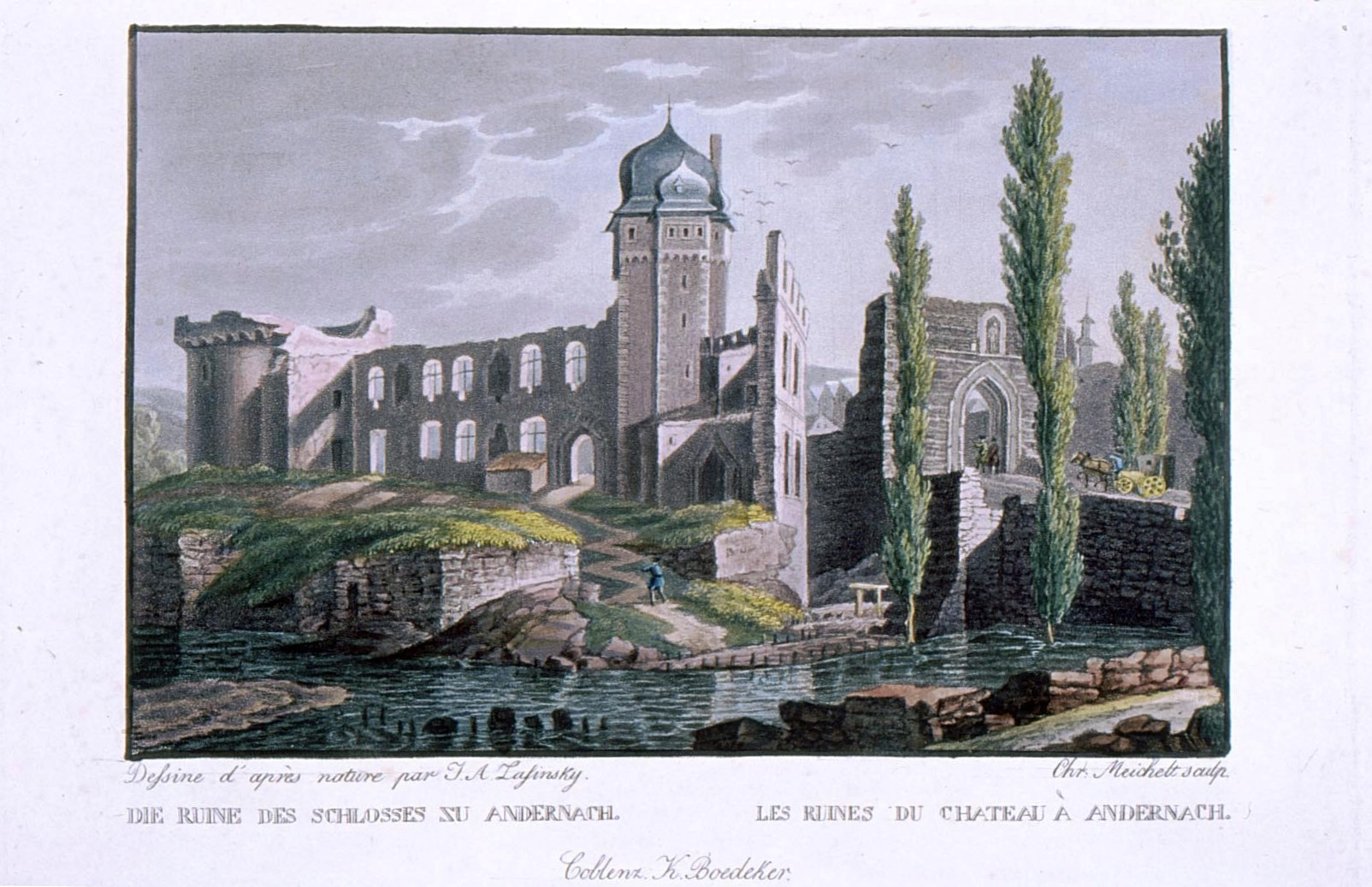 Altkolorierter Aquatintastich von Christian Meichelt nach Vorlage von J.A. Lasinsky um 1830